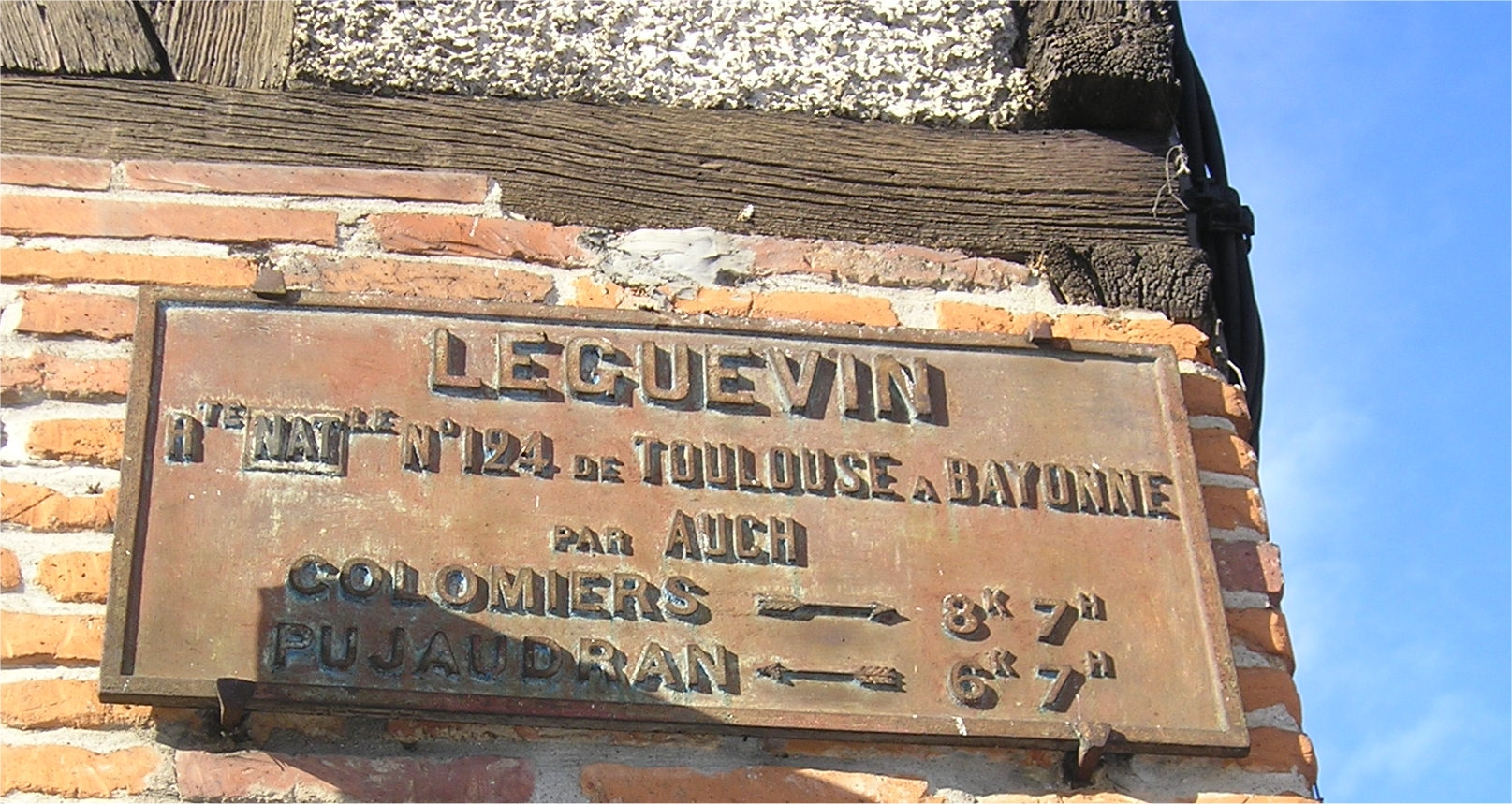 Ancien panneau de Léguevin indiquant la distance de Colomiers (8 km 7 hectomètres) et de Pujaudran (6 km 7 hectomètres). Ce panneau est fixé sur la façade de l'ancien relais de poste.